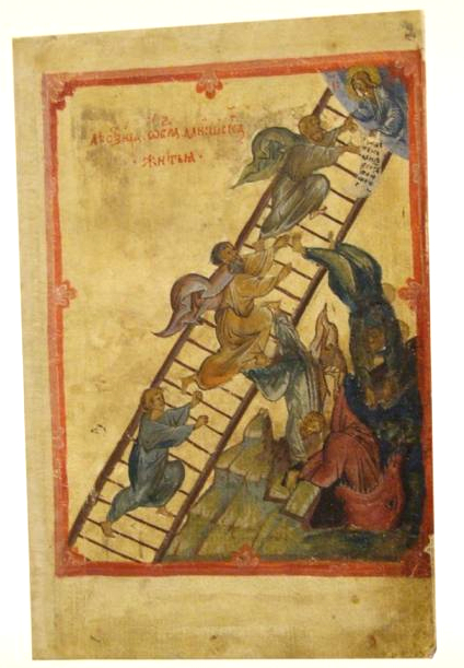 ЛЕСТВИЦА ПРЕПОДОБНОГО ИОАННА ЛЕСТВИЧНИКА. СЛОВА И ГЛАВИЗНЫ СИМЕОНА НОВОГО БОГОСЛОВА Первая четверть XV века (1410-е ?) Москва (?) 342 л. Бумага, чернила, киноварь, краски, золото; переплет – дерево, кожа; золотое тиснение 204 x 133 Поступила в 1962 году Находилась в собрании В.А. Десницкого РГБ инв. ф. 439, к. 21, д. 1